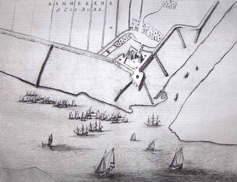 Fort Rammekens, Zeeland about 1650